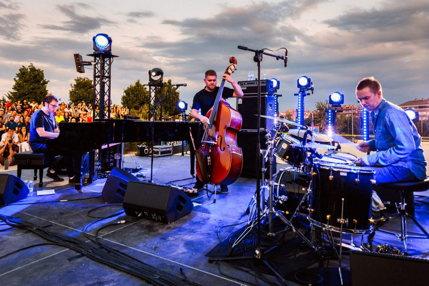 El Auditorio al aire libre del Parque de la Cuña Verde de O’Donnell fue escenario ayer viernes, 17 de agosto, del concierto de Gogo Penguin, uno de los grupos estrella en el panorama del jazz inglés, que tocaba por primera vez en Madrid, dentro de la programación de Veranos de la Villa.